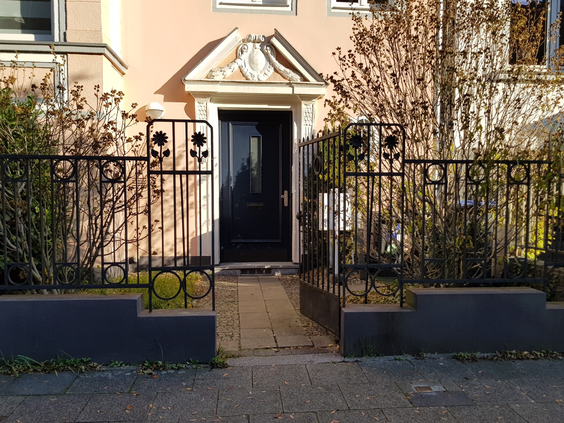 Stolperstein Prinz-Albrecht-Str. 14, Duisburg-Duissern